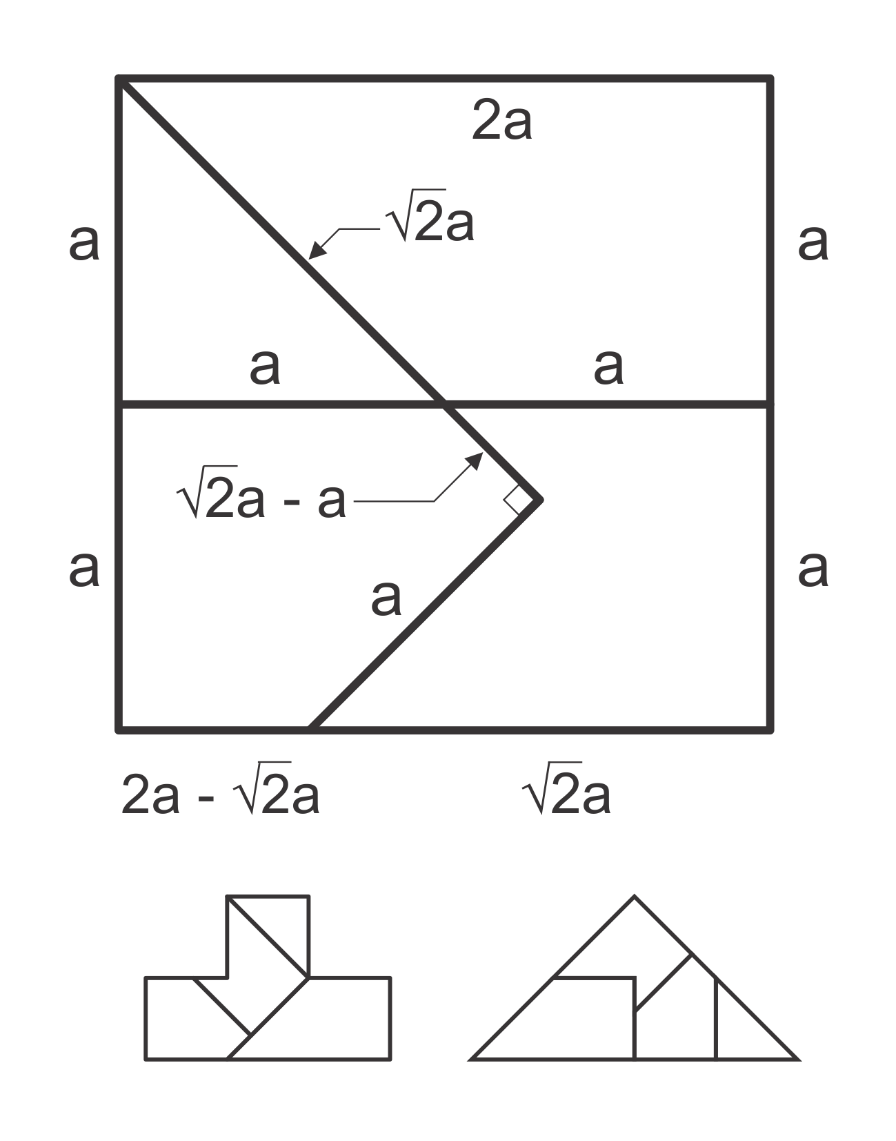 Hình ảnh Small T (T4)